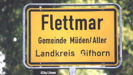 Ortseingangsschild von Flettmar